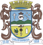 Brasão do Município de Carlos Barbosa - RS - Brasil